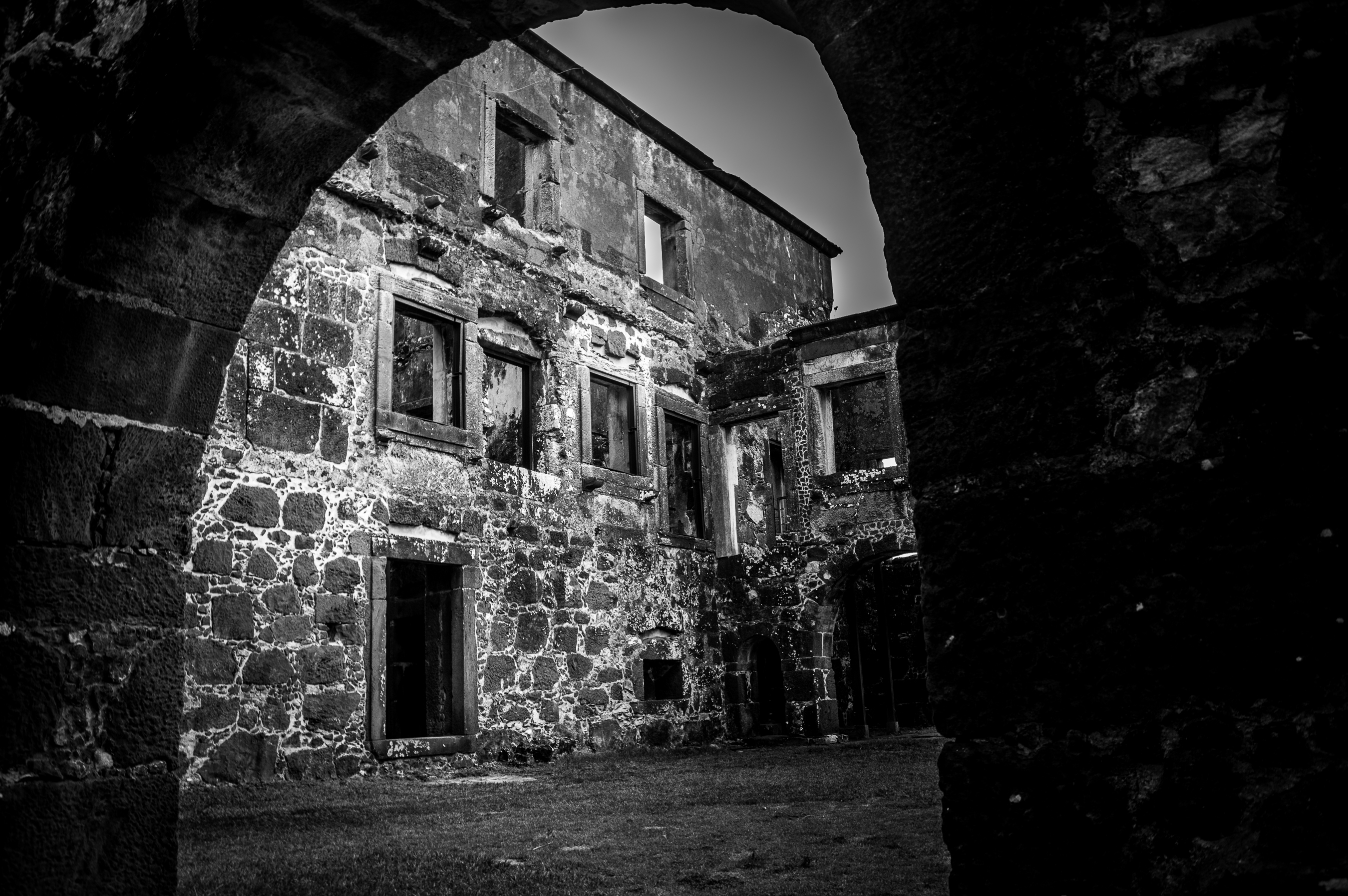 Casa da Torre de Garcia d'Ávila